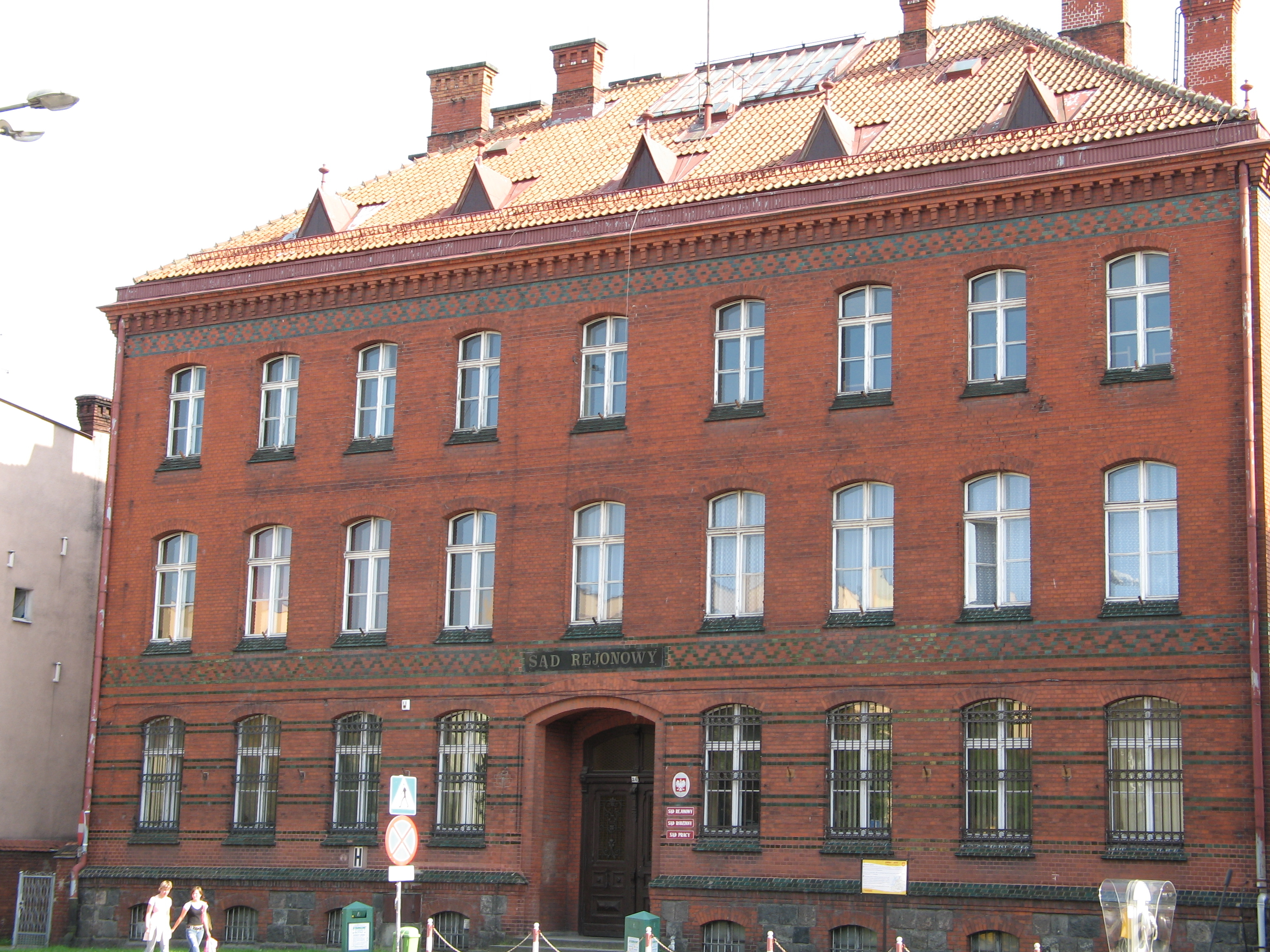 Starogard Gdański, ul. Tadeusza Kościuszki 30 - budynek sądu rejonowego.